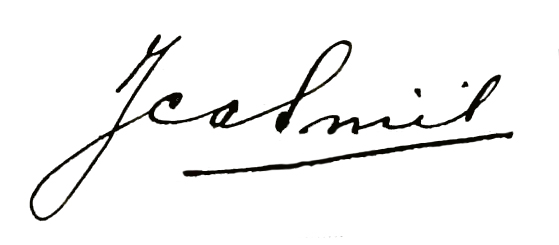 Jan Smit signature.